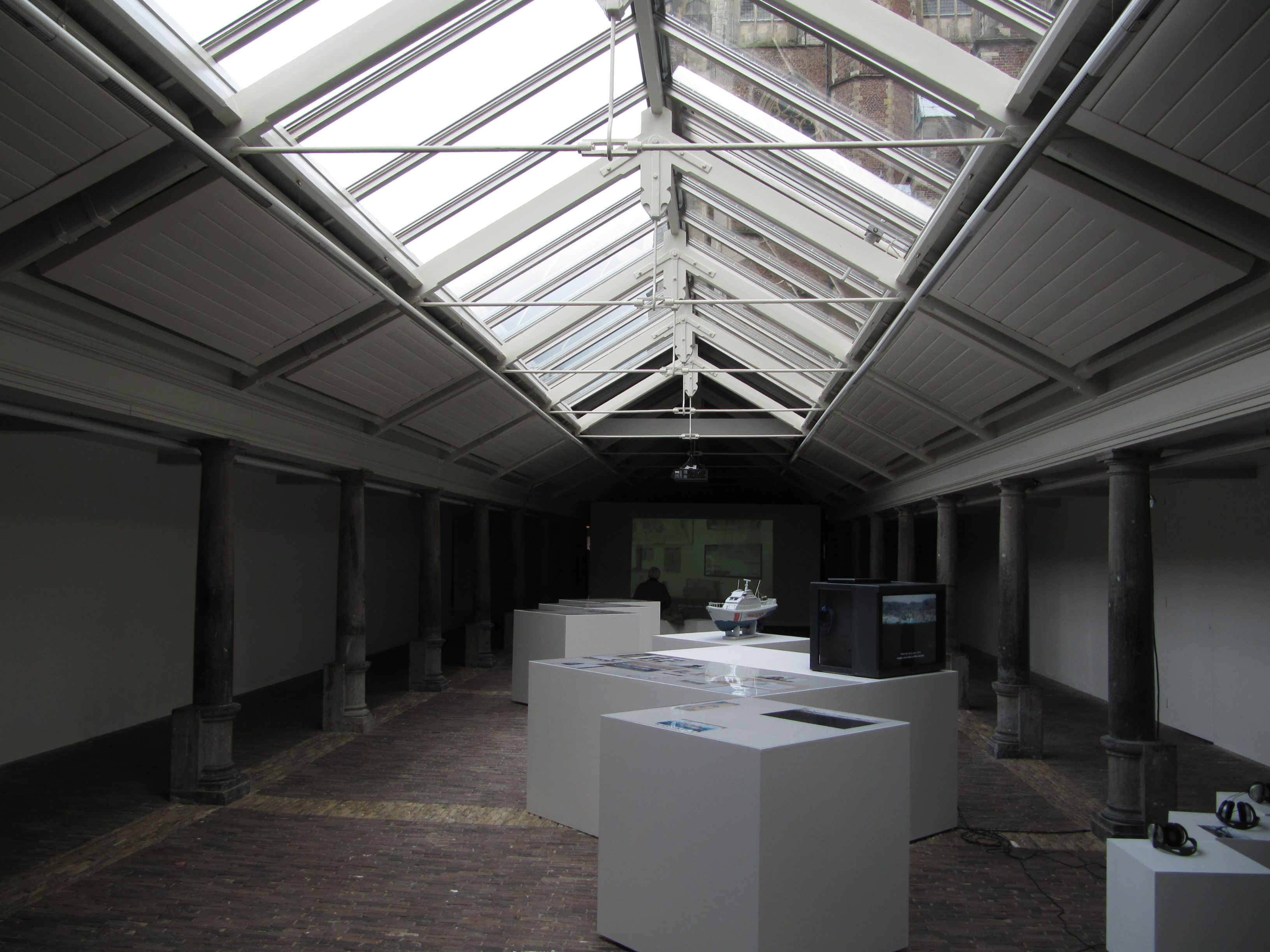 RM19263 Haarlem - Grote Markt 20 (vishal).jpg